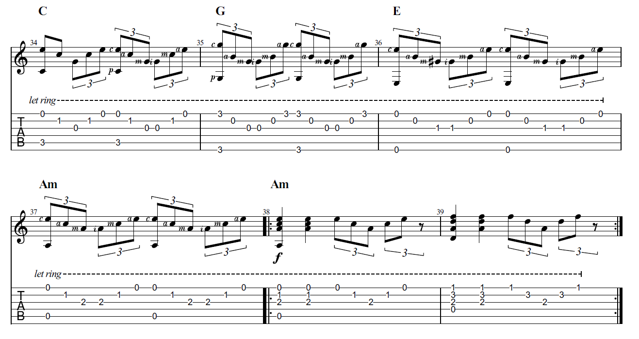 Gitarrennoten mit Tabulatur. Die Buchstaben q, a, m und i bezeichnen die Finger der zupfenden Hand.